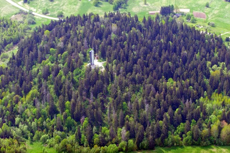 Suur Munamägi kirdest